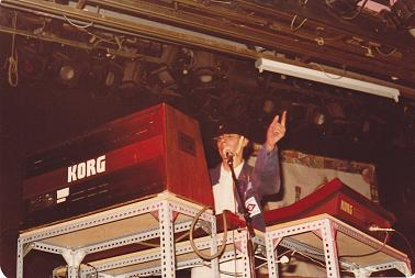 Waq en su primer concierto en Rockola